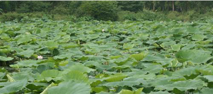 Jingtang Lotus Root's Botany